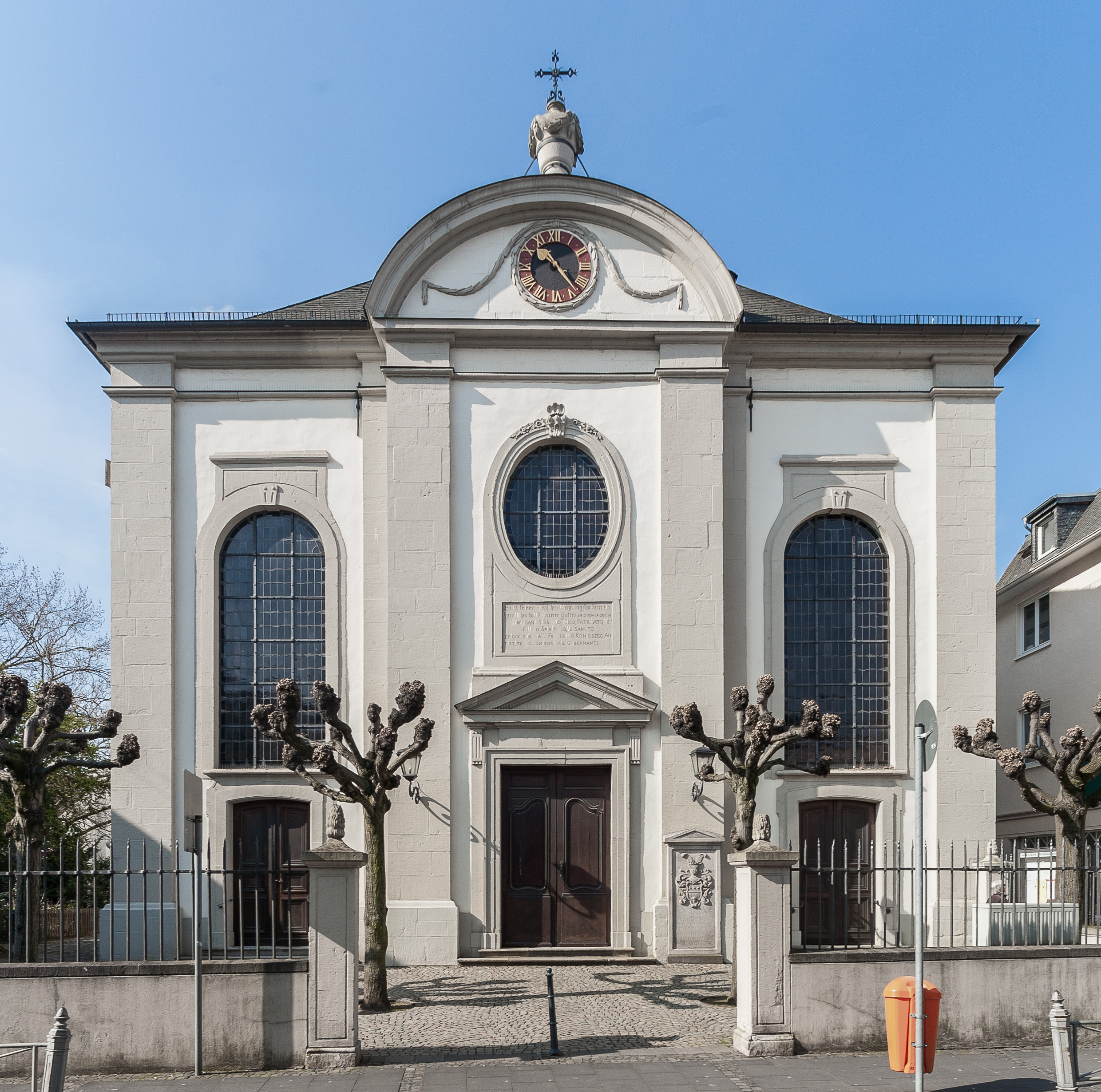 Kath. Pfarrkirche St. Remigius, Hauptstraße 410, Königswinter